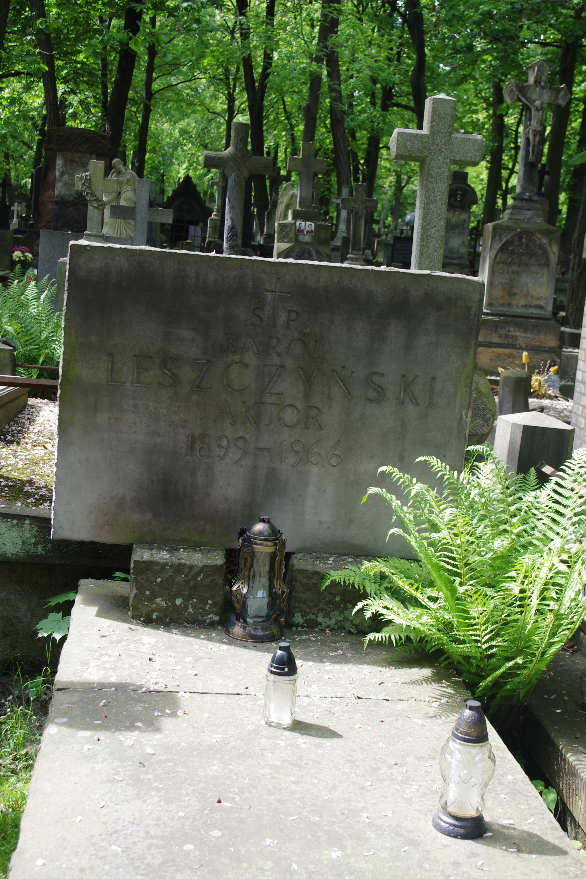 Grób aktora Karola Leszczyńskiego na Starych Powązkach w Warszawie